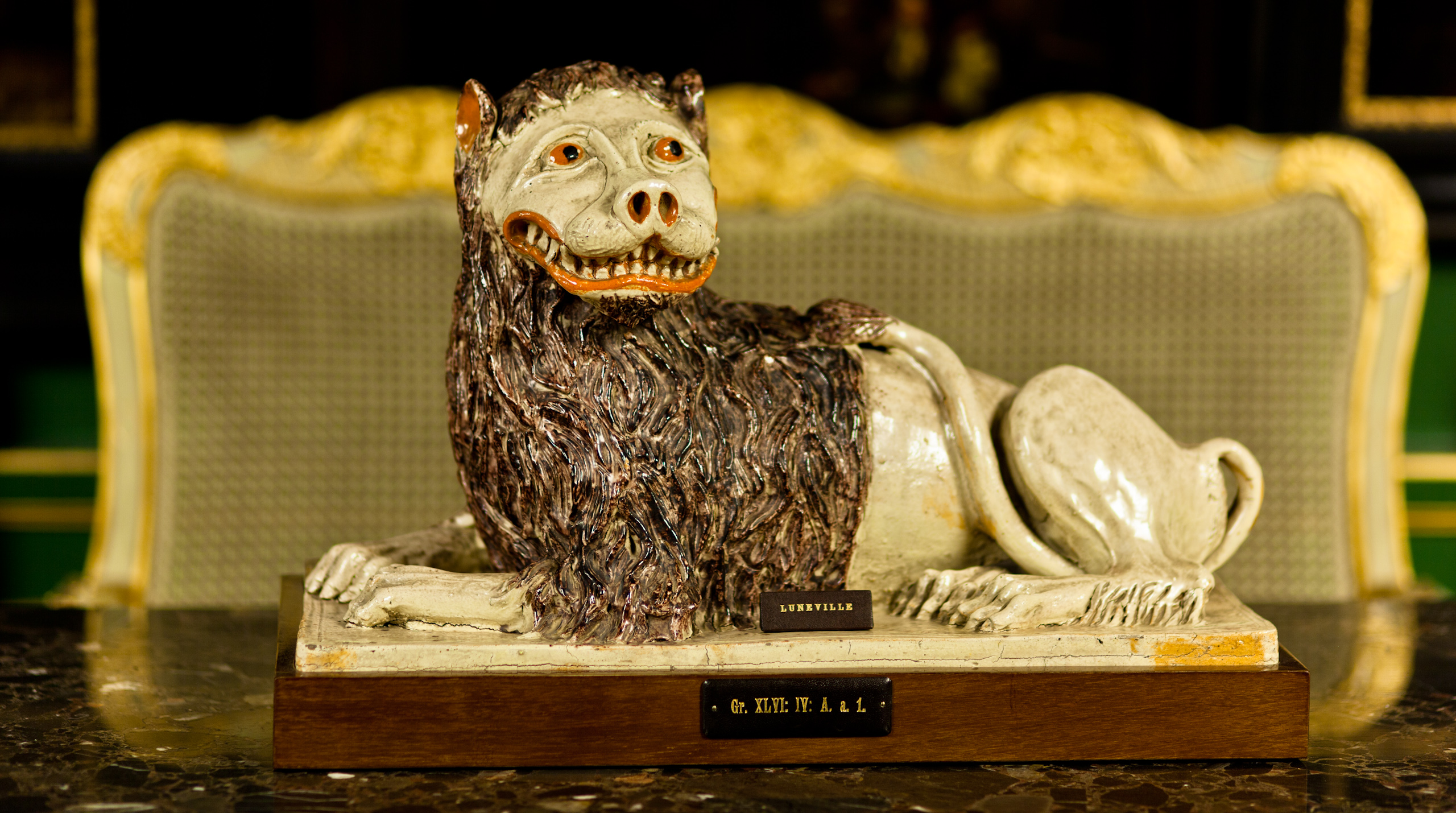 Hundskulptur från Lunéville, Frankrike, i kägelbanan i Hallwylska museet. Liggande Fôhund i antik stil; huvudet vridet åt vänstra sidan, framtassarna lagda snett mot varandra, baktassarna vid kroppens vänstra sida, svansen nedböjd mellan bakbenen samt uppsvängd längs bukens vänstra sida med tofsen på ryggen; på rektangulär fotplatta. Godset gulvitt, täckt med blyglasyr. Ögon med brungul iris och svart pupill, gapet grinande med en tät tandrad synlig. Manen i mangangredelint, kroppen i övrigt liksom huvudet i blekt grågult. Höjd 33 cm. Fotplatta, längd 53,8 cm, bredd 26 cm. Datering: 1700-talets slut. Inköpt från konsthandlaren H. Bukowski, Stockholm år 1919. Inventarienr: XLVI:IV:A.a.01.